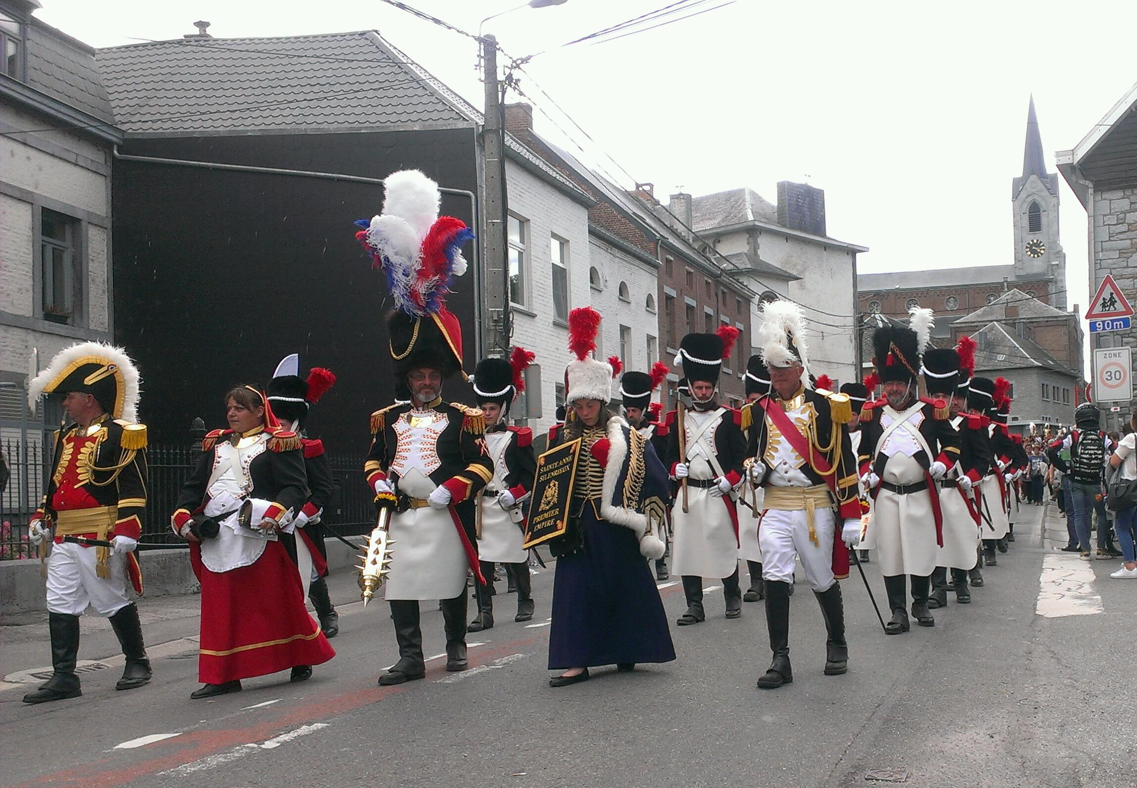 Marche Sainte-Anne in Silenrieux, op zondag 30 juli 2017.